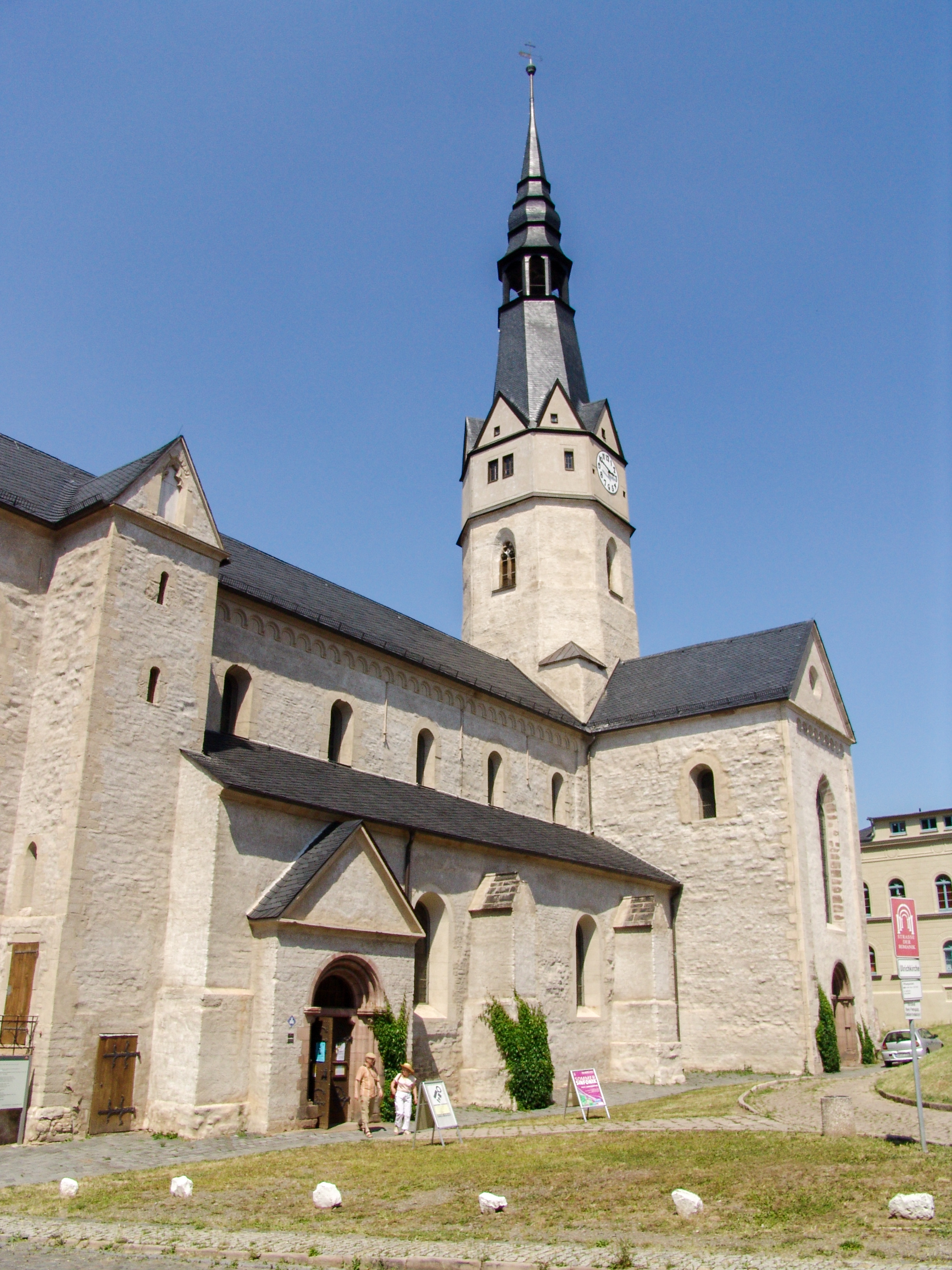 St. Ulrici in Sangerhausen